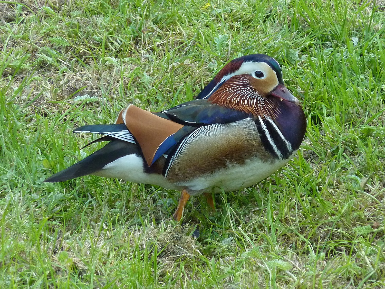 Mandarinente im Wildpark Connewitz, Leipzig